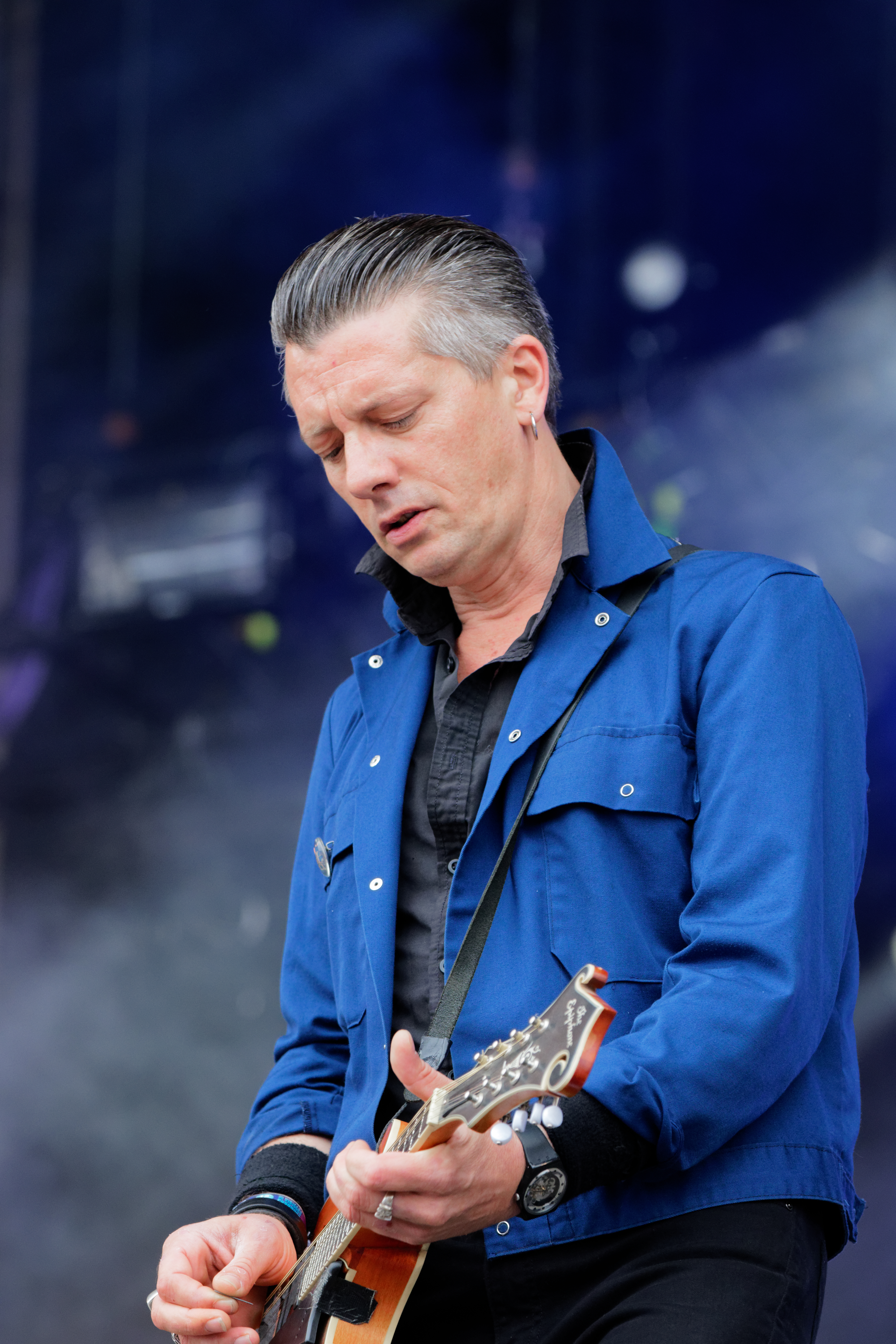 The Celtic Social Club en concert lors du festival des vieilles charrues 2017.